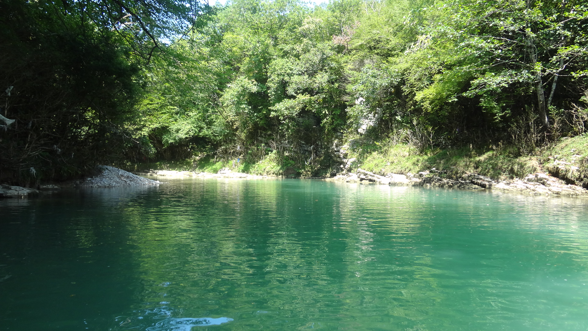 მდინარე აბაშა სოფელ გაჭდილთან